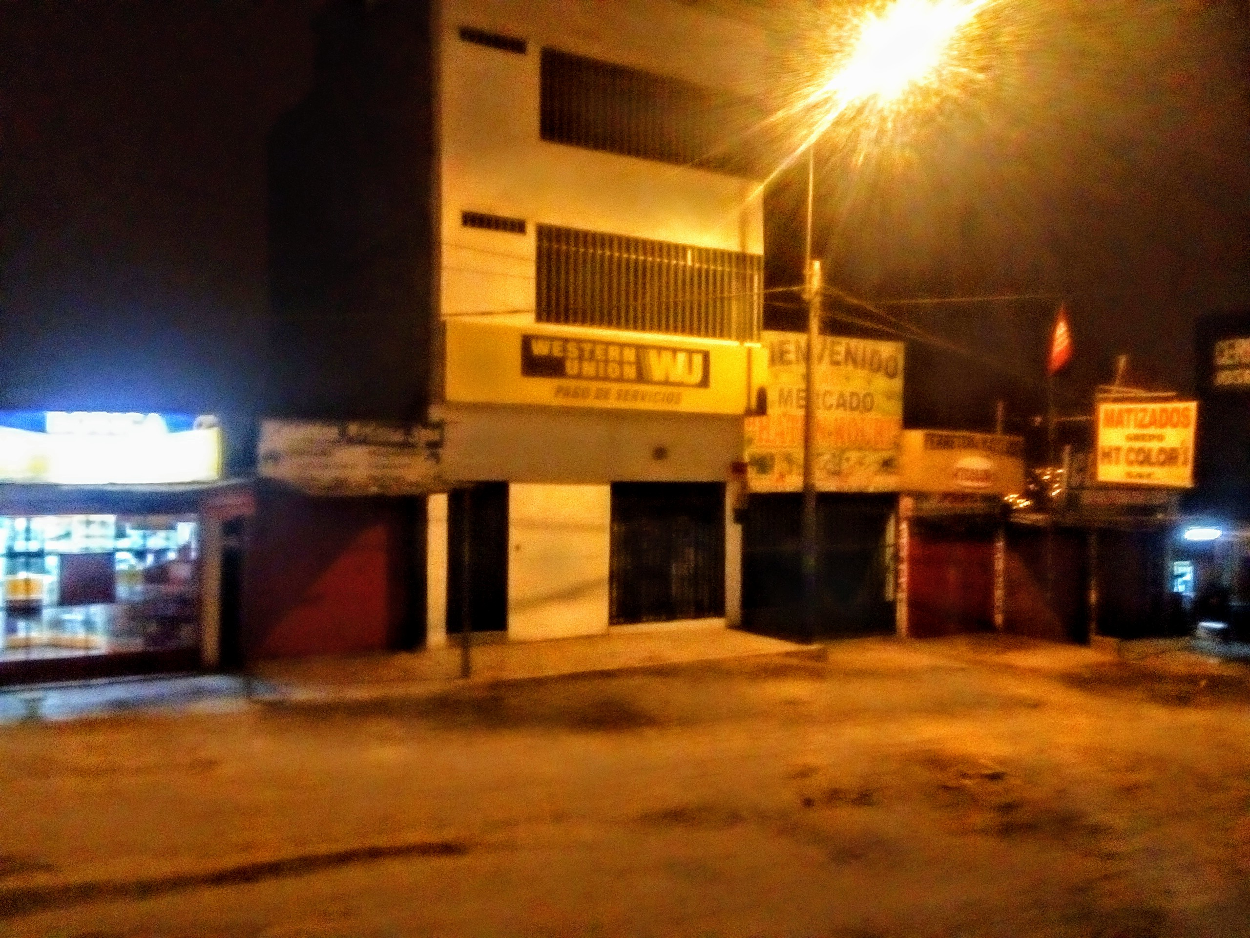 Westerm Union en Av 225